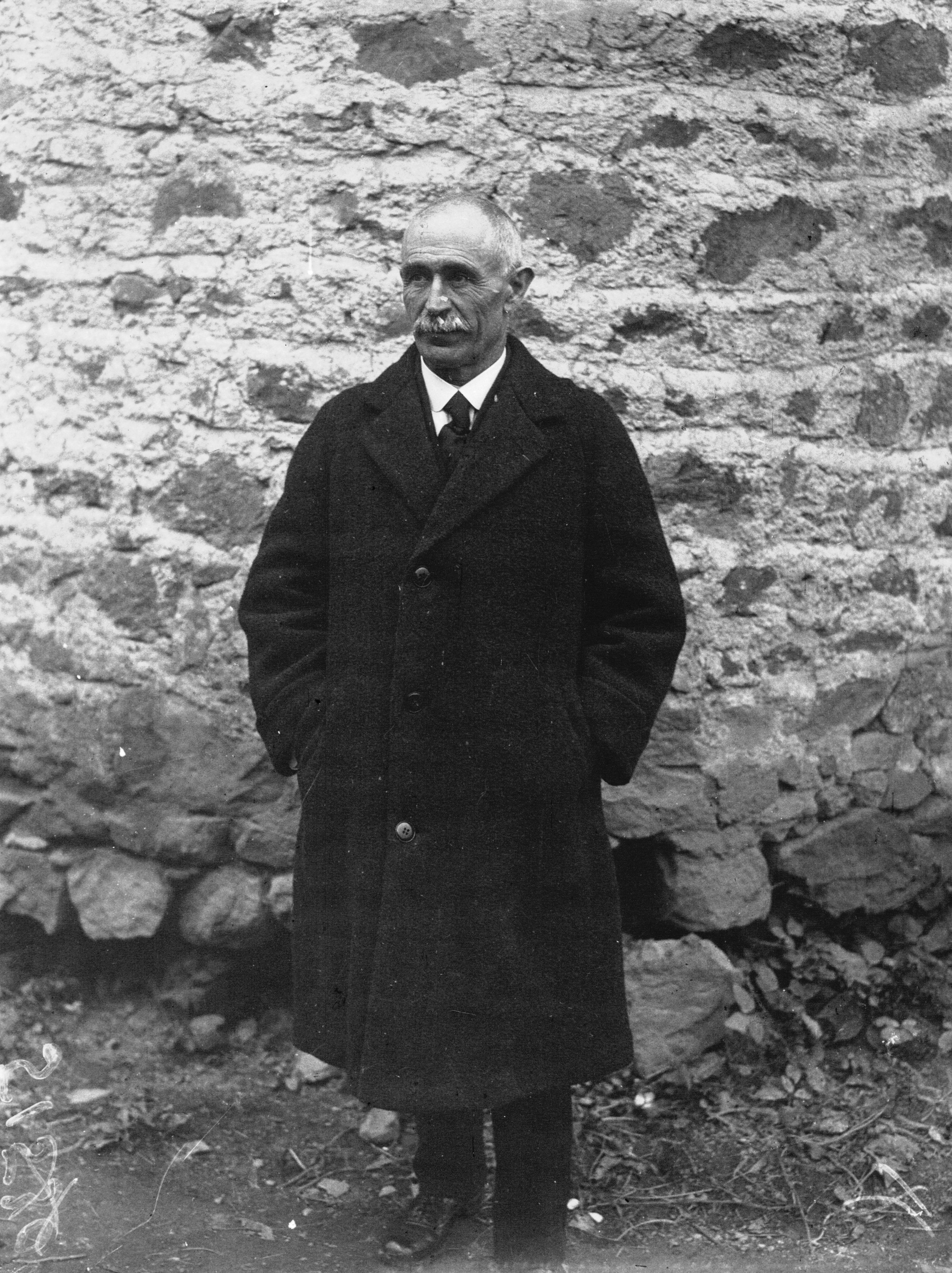 Peyrony : musée de Glozel : (photographie de presse : Agence Meurisse)